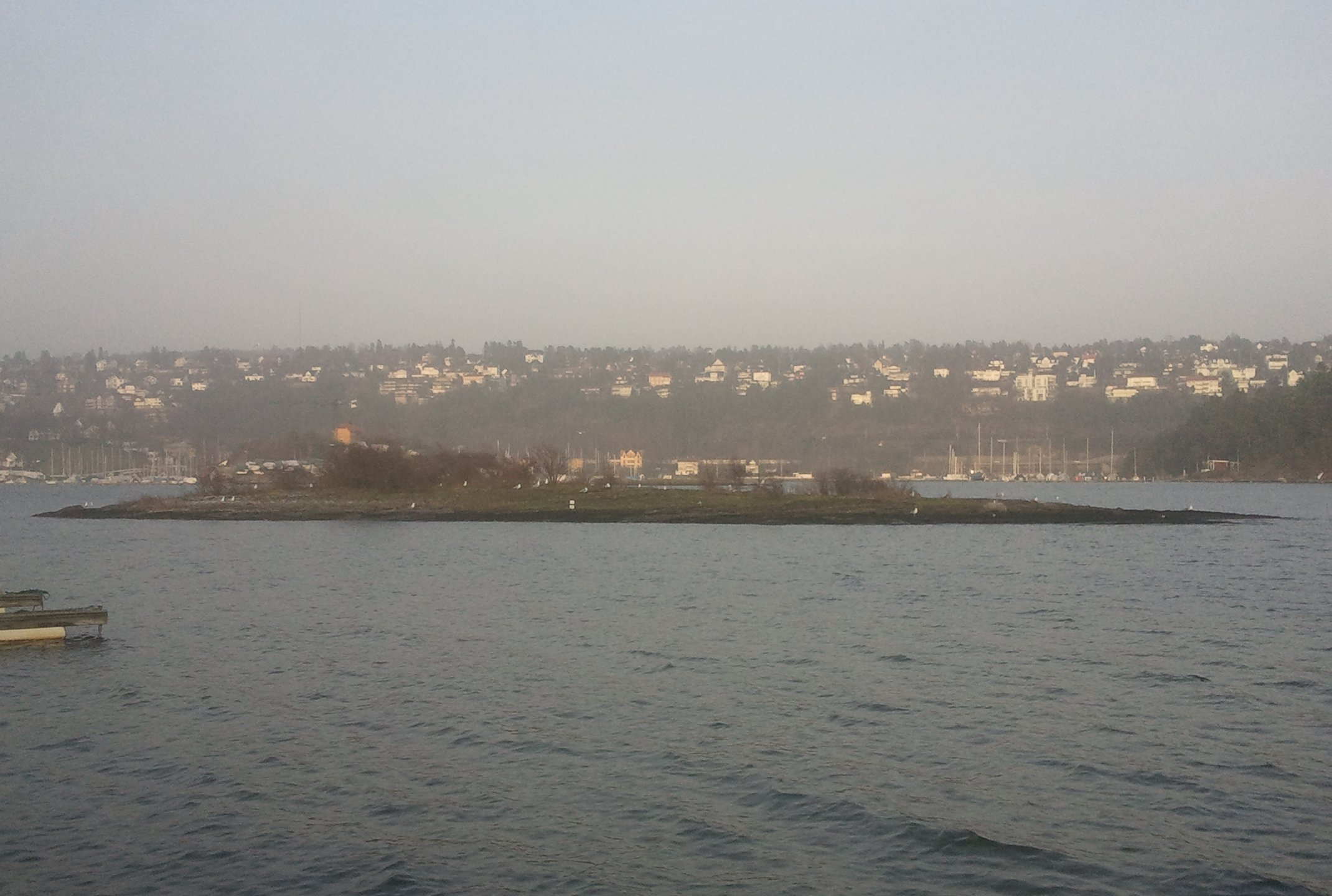 Selskjær (Kaninøya) sett fra Malmøya mot Bekkelagsskråningen.